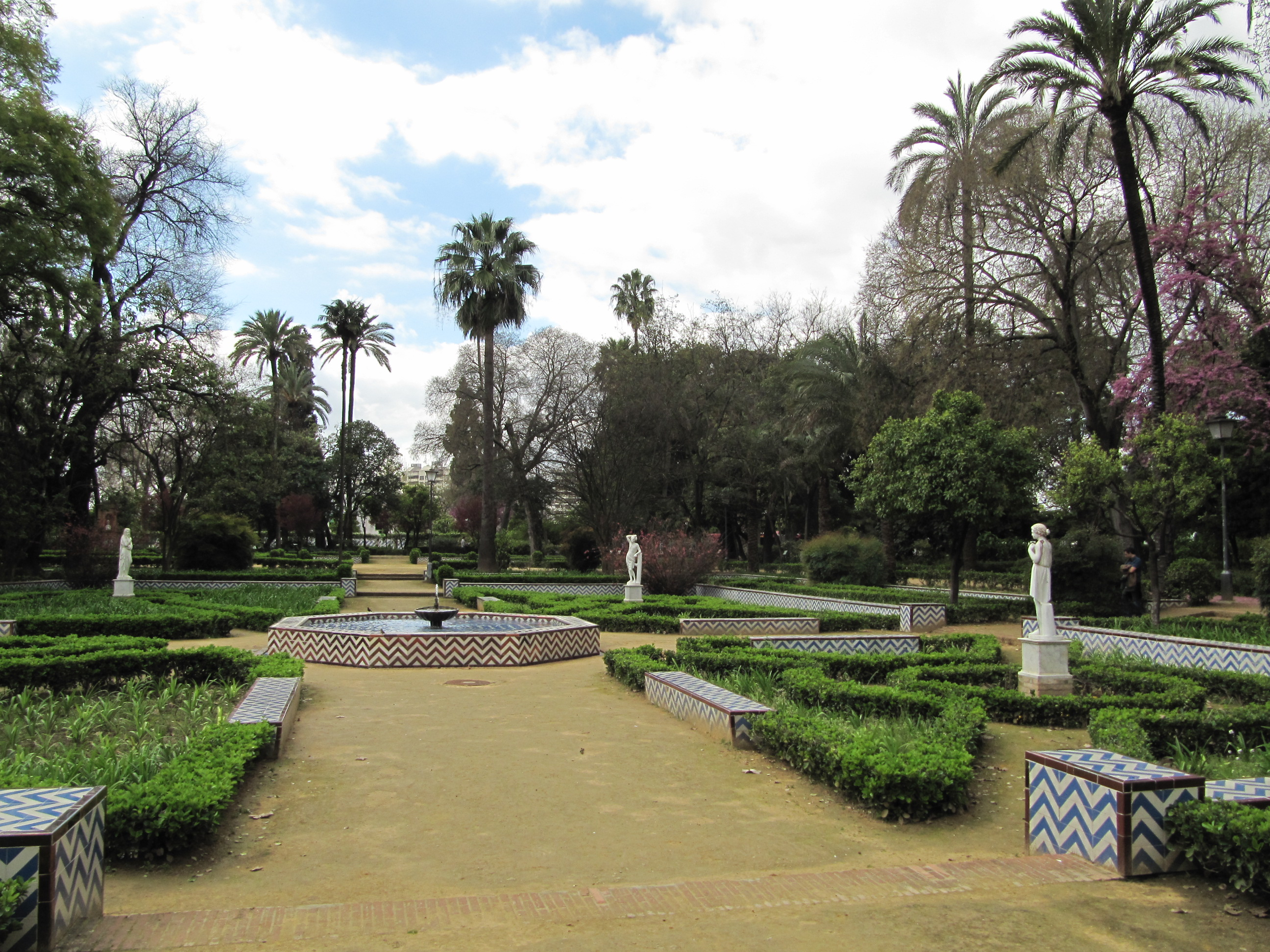 Sevilla - March 2011 - 027.jpg